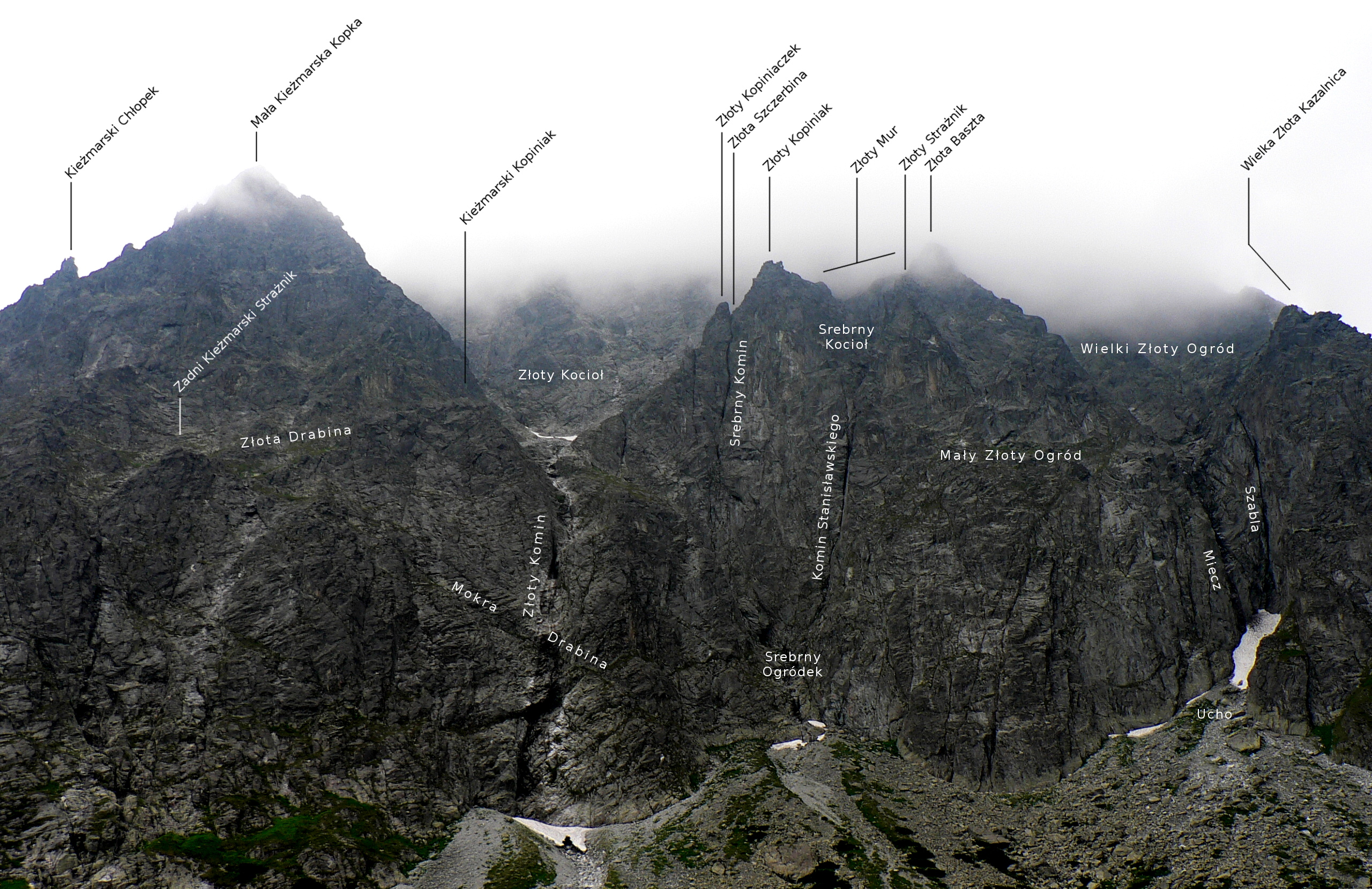 Północna ściana Małego Kieżmarskiego Szczytu. Podpisane obiekty